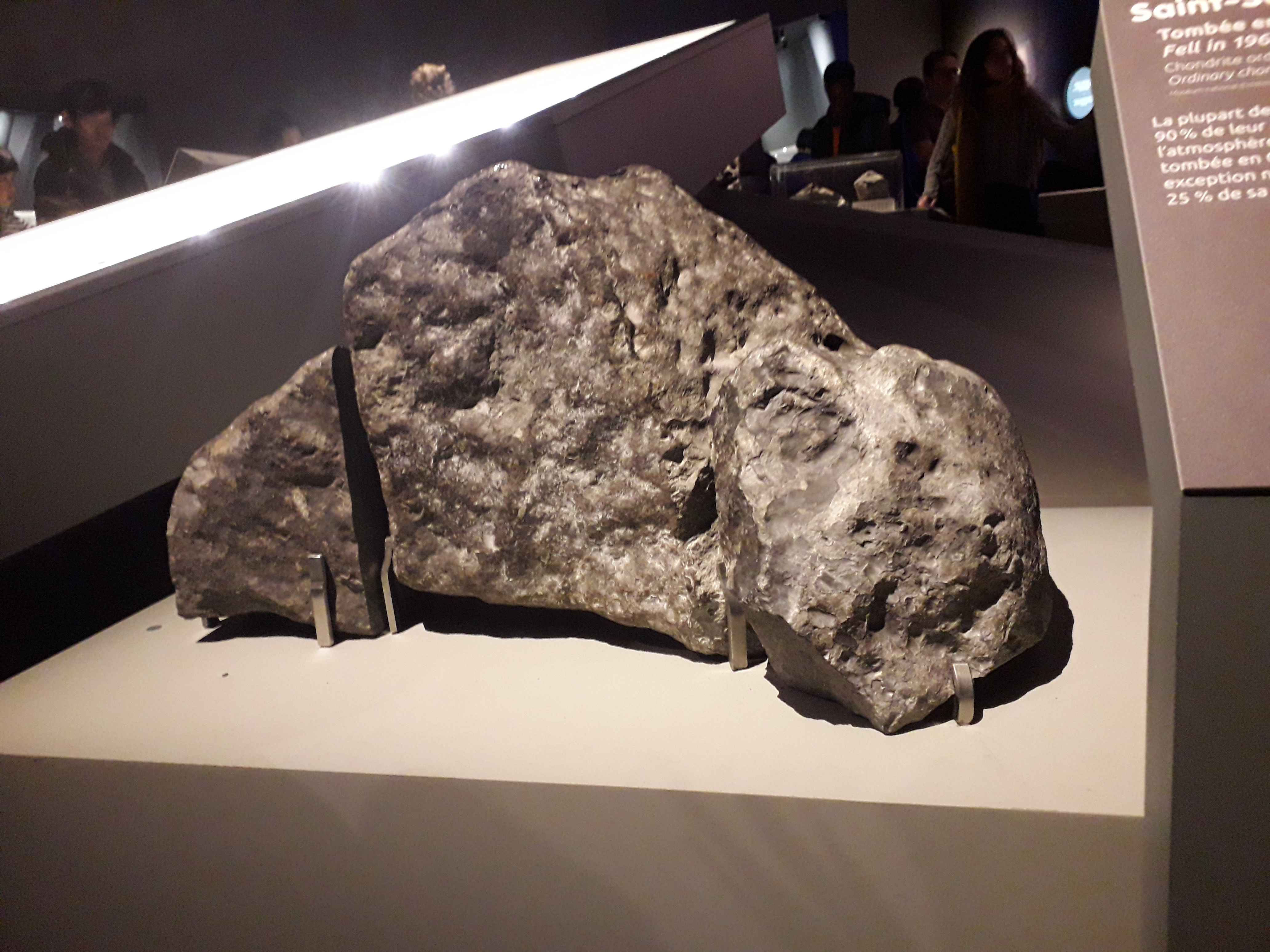 Météorite Saint-Séverin, tombée en 1966 en France. Composée de chondrite ordinaire (LL6). Cette météorite est tombée en Charente. Elle est remarquable car, contrairement à la majorité des météorites qui perdent 90% de leur masse pendant leur traversée de l'atmosphère terrestre, elle n'a perdu que 25% de sa masse. Exposée à l'occasion de l'exposition "Météorites", dans le bâtiment de la grande galerie de l'Evolution, au Muséum national d'histoire naturelle de Paris (18 octobre 2017 - 10 juin 2018).